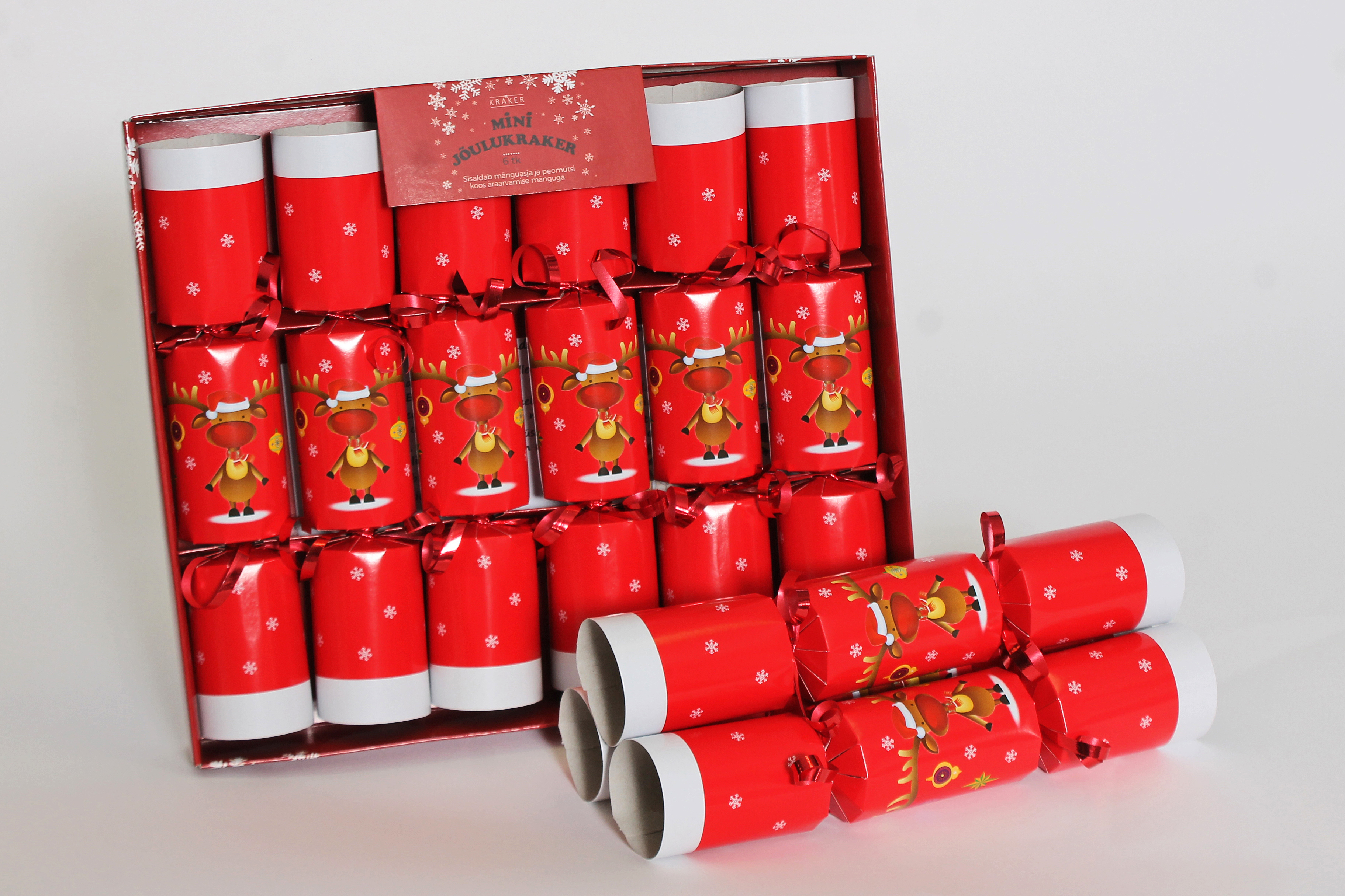 Eesti Mini Jõulukrakerid